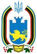 Эмблема Львовского государственного университета физической культуры